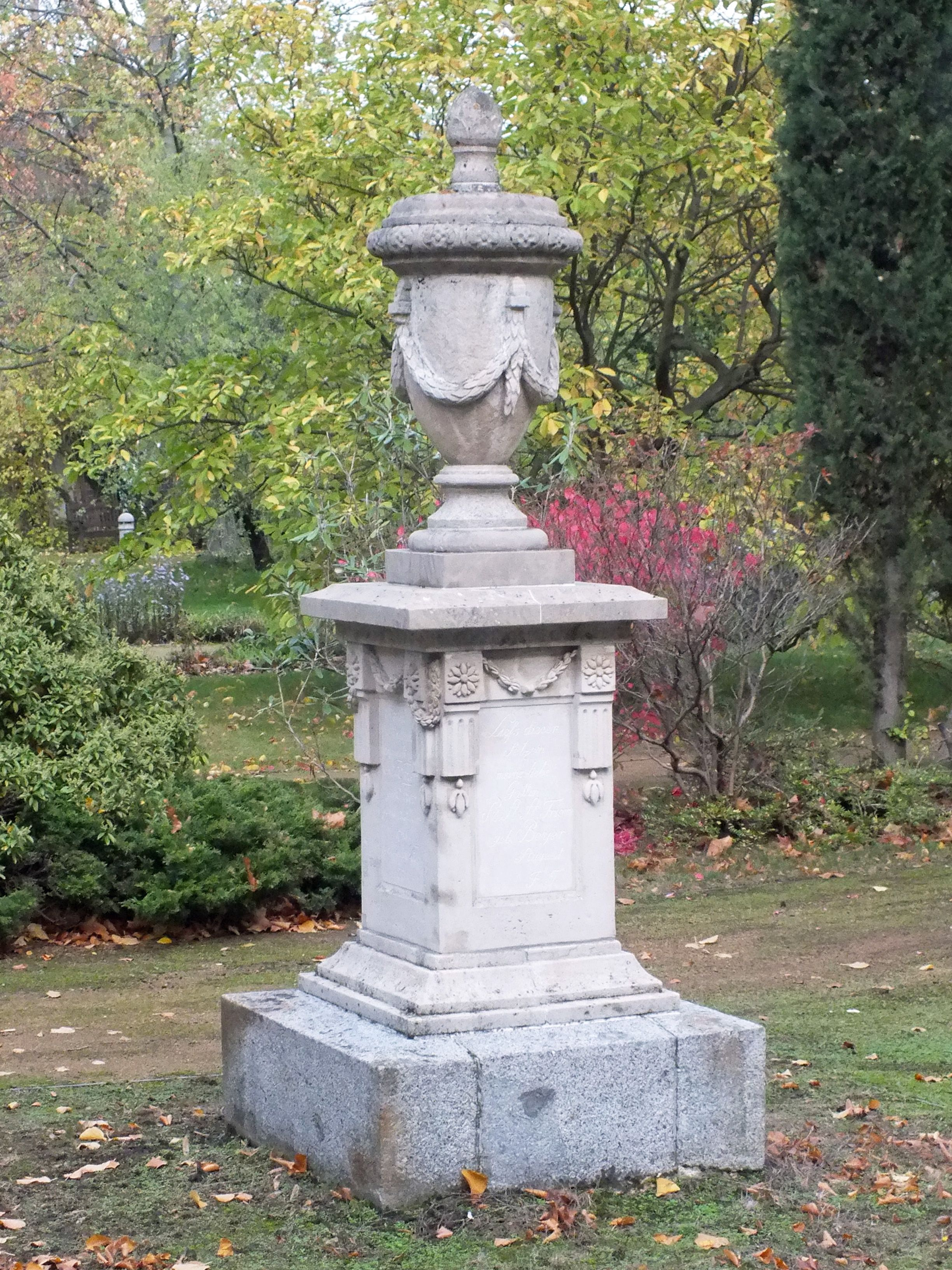 Trier-Denkmal in Leipzig, hinter der ehemaligen Frauenklinik Philipp-Rosenthal-Straße